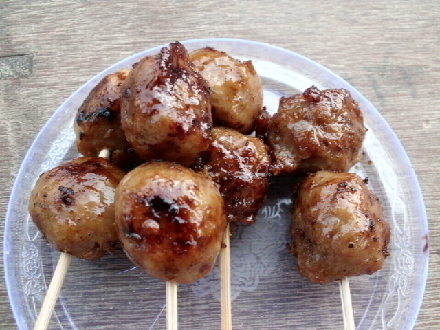 pentol bakar